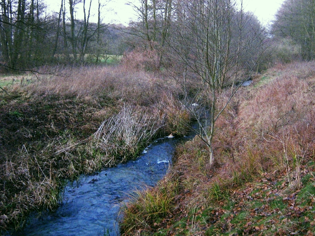 Der Ziemenbach zwischen Hohenzieritz und Prillwitz (Landkreis Mecklenburg-Strelitz). 53°26′59.55″N 13°7′49.29″E / 53.449875°N 13.1303583°E